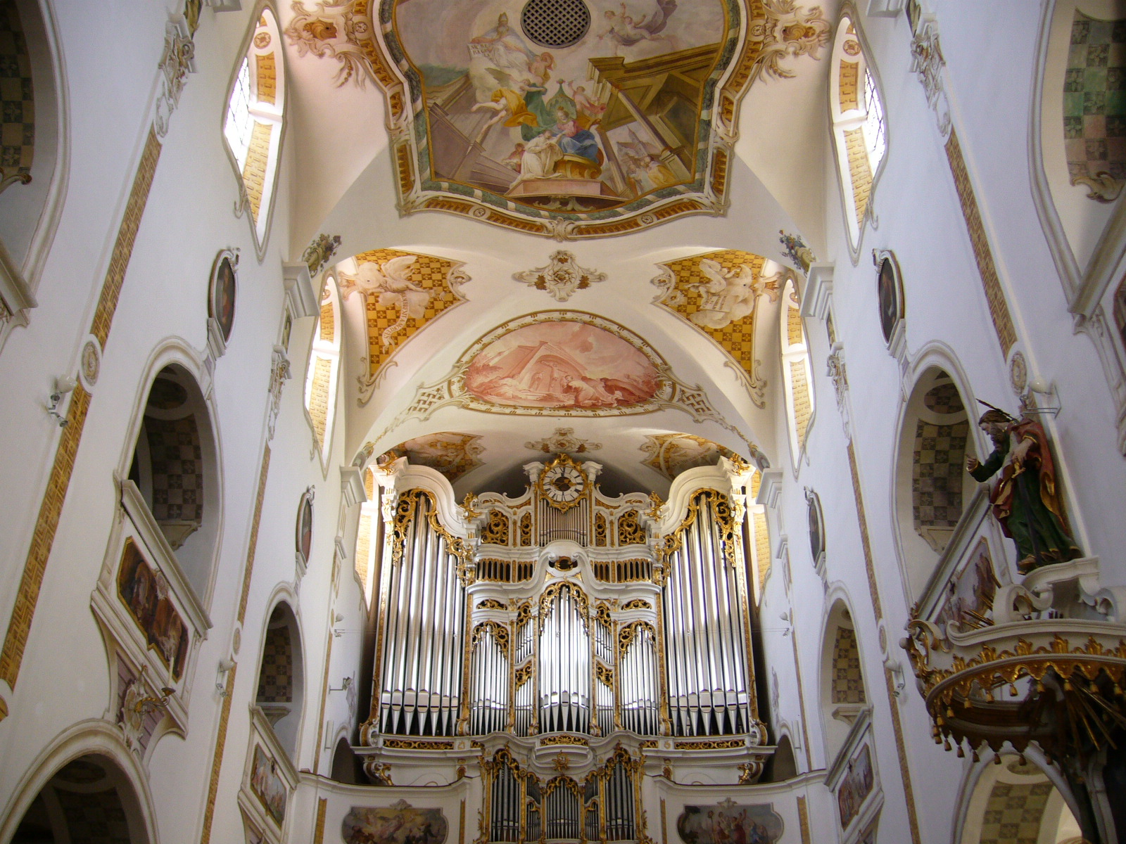 Orgel in der Kirche Ursberg, erbaut von Johann Nepomuk Holzhey. Fotografiert von Peter Berger, am 9. Juni 2006.